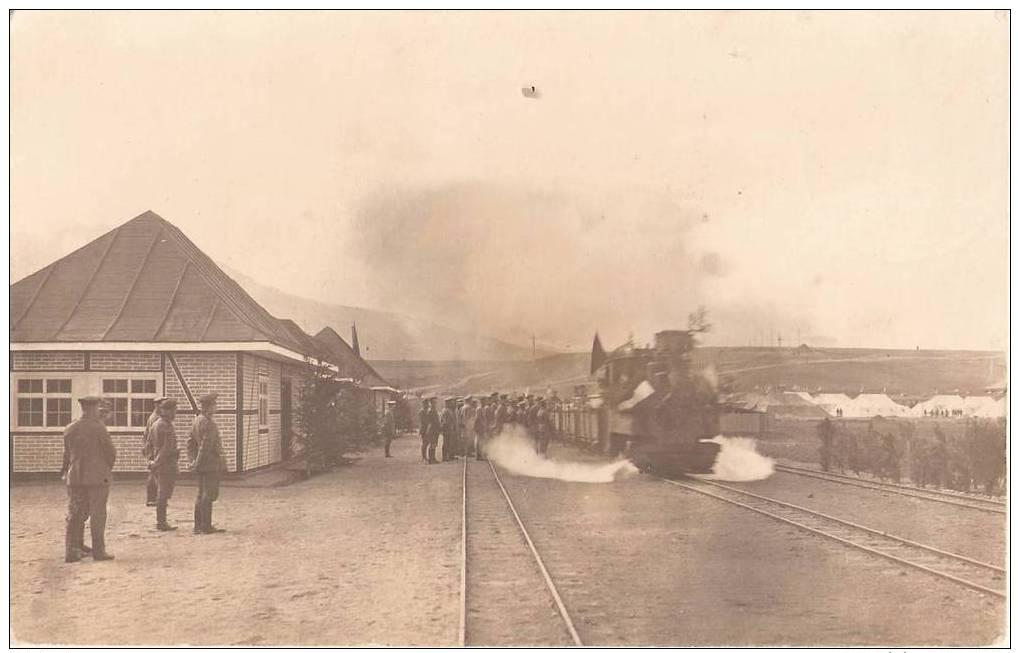 Гарата в Градско през Първата световна война